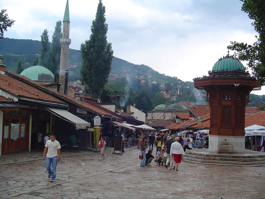 Le Barcasija à Sarajevo Photo prise par mes soins